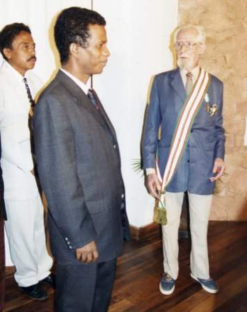 Charles Domergue - Décoration de la Grand Croix